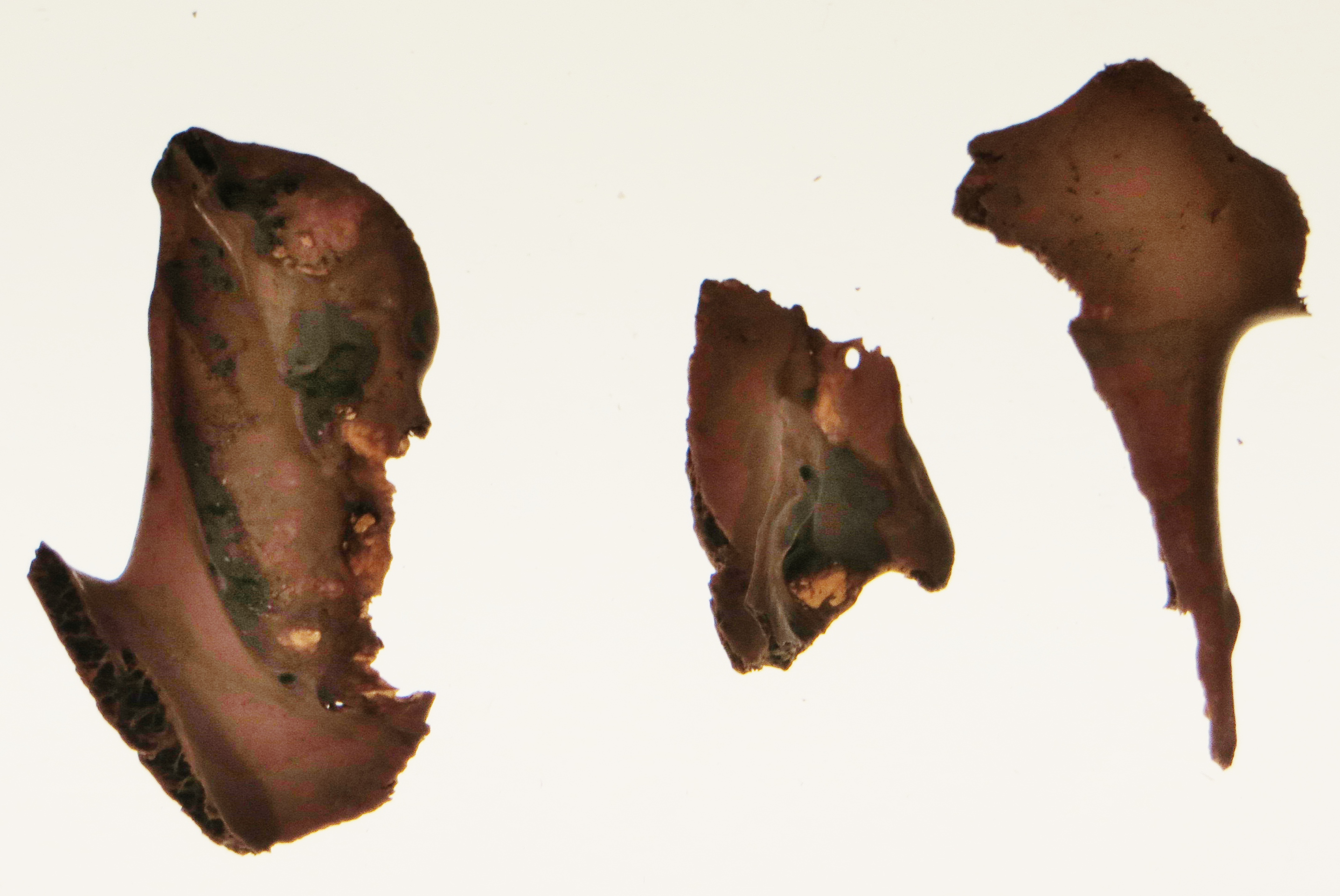 Fossil of Lophopsittacus - Took the picture at Naturalis, Leiden